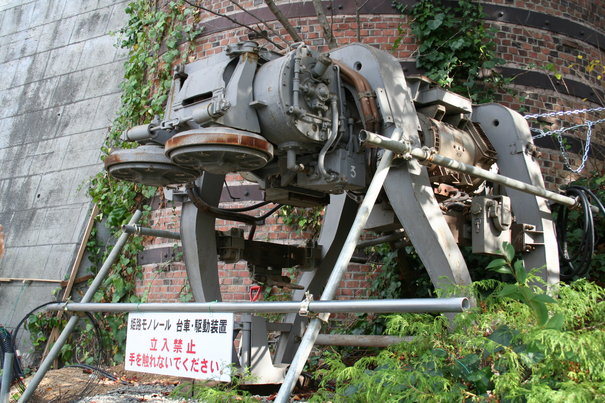 2009年11月15日、手柄山中央公園内にて公開された姫路モノレールの車両。 姫路モノレールの車両の台車と駆動装置。